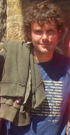 Daniel Zueras camiseta con palabras en Aragonés